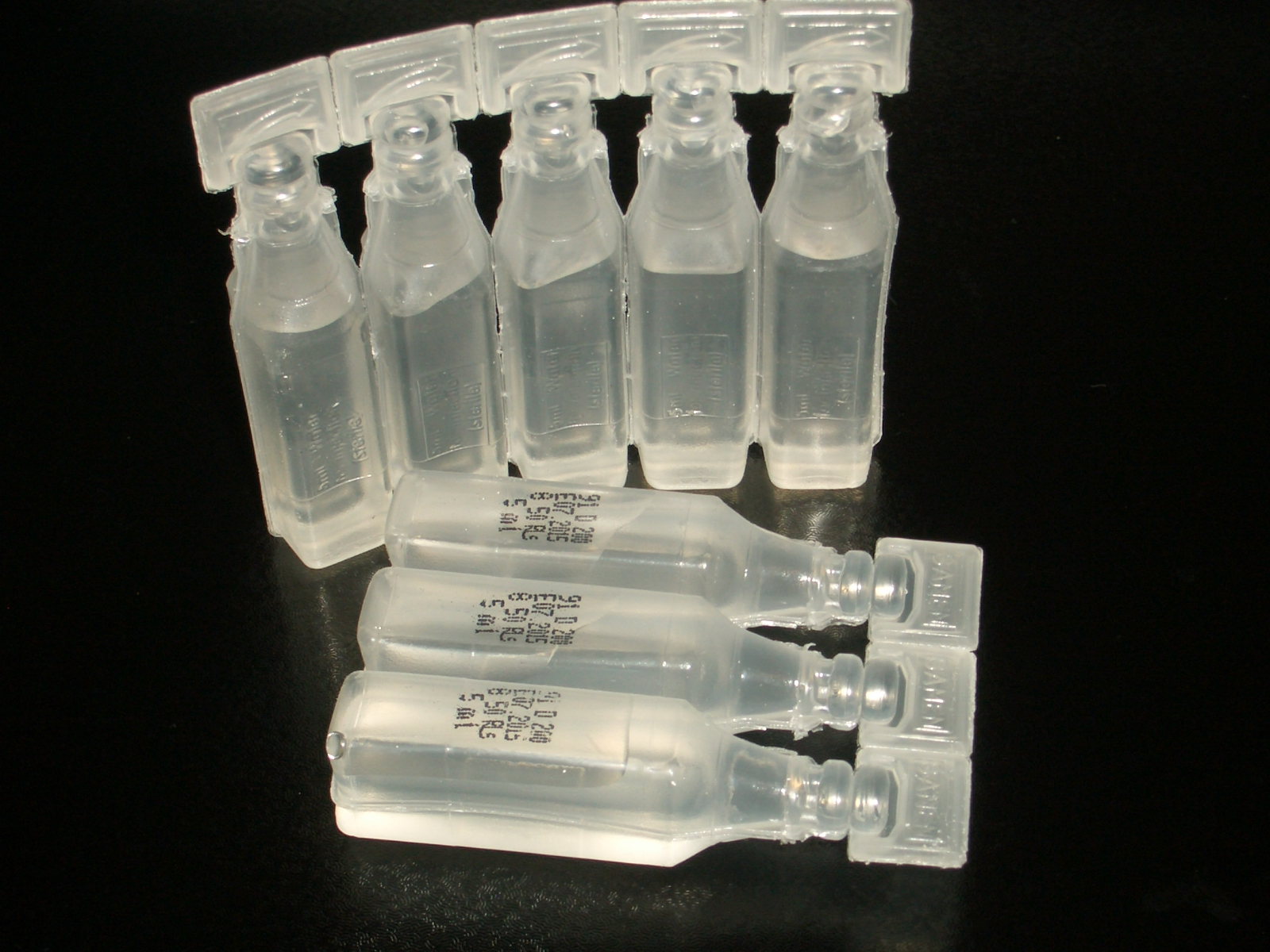 آب مقطر استریل شده جهت تزریقات